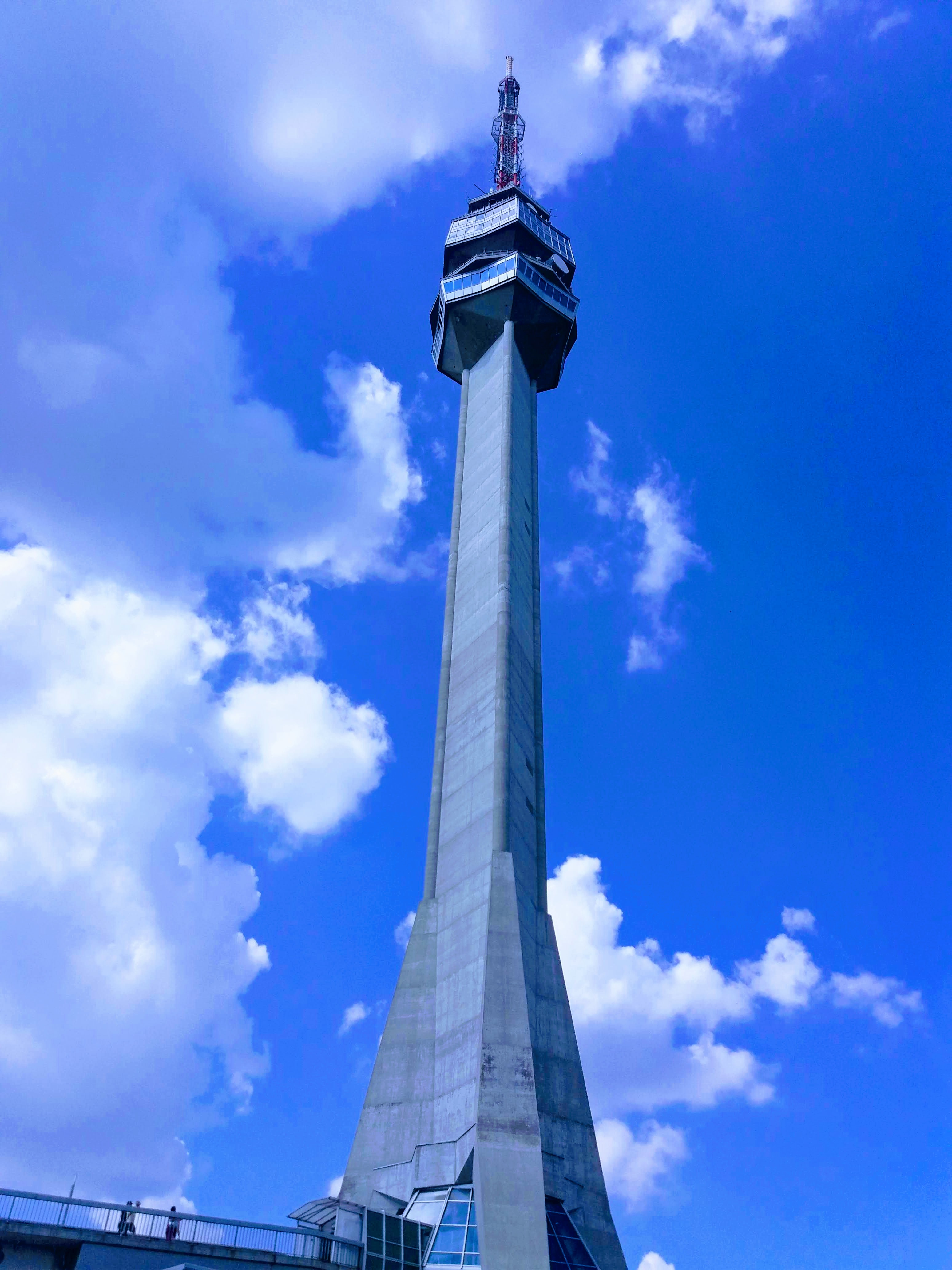 Srpski (latinica): Avala